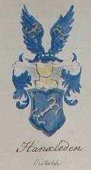 Wappen der Adelsfamilie von Hanxleden